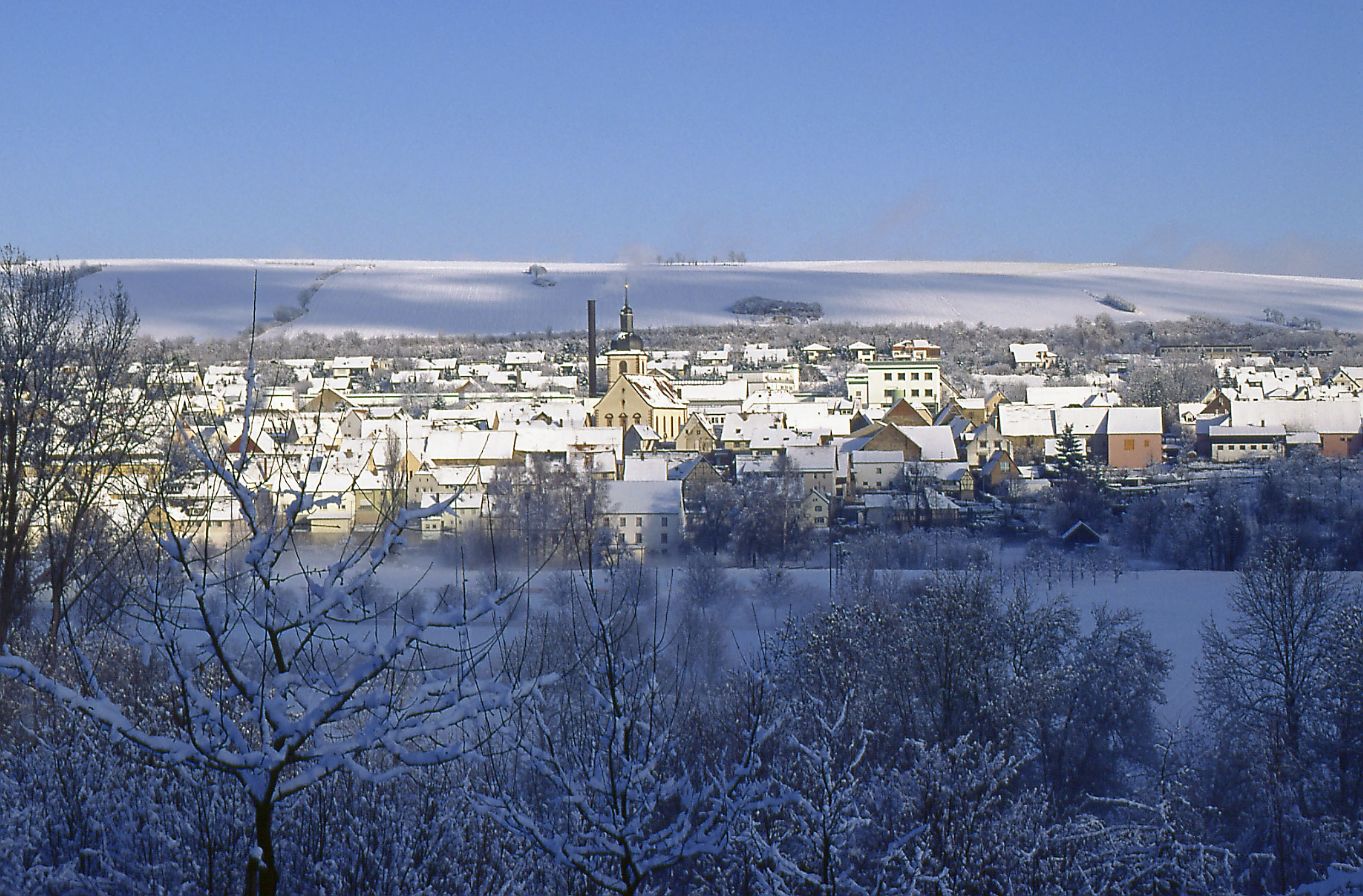 Distelhausen im Winter